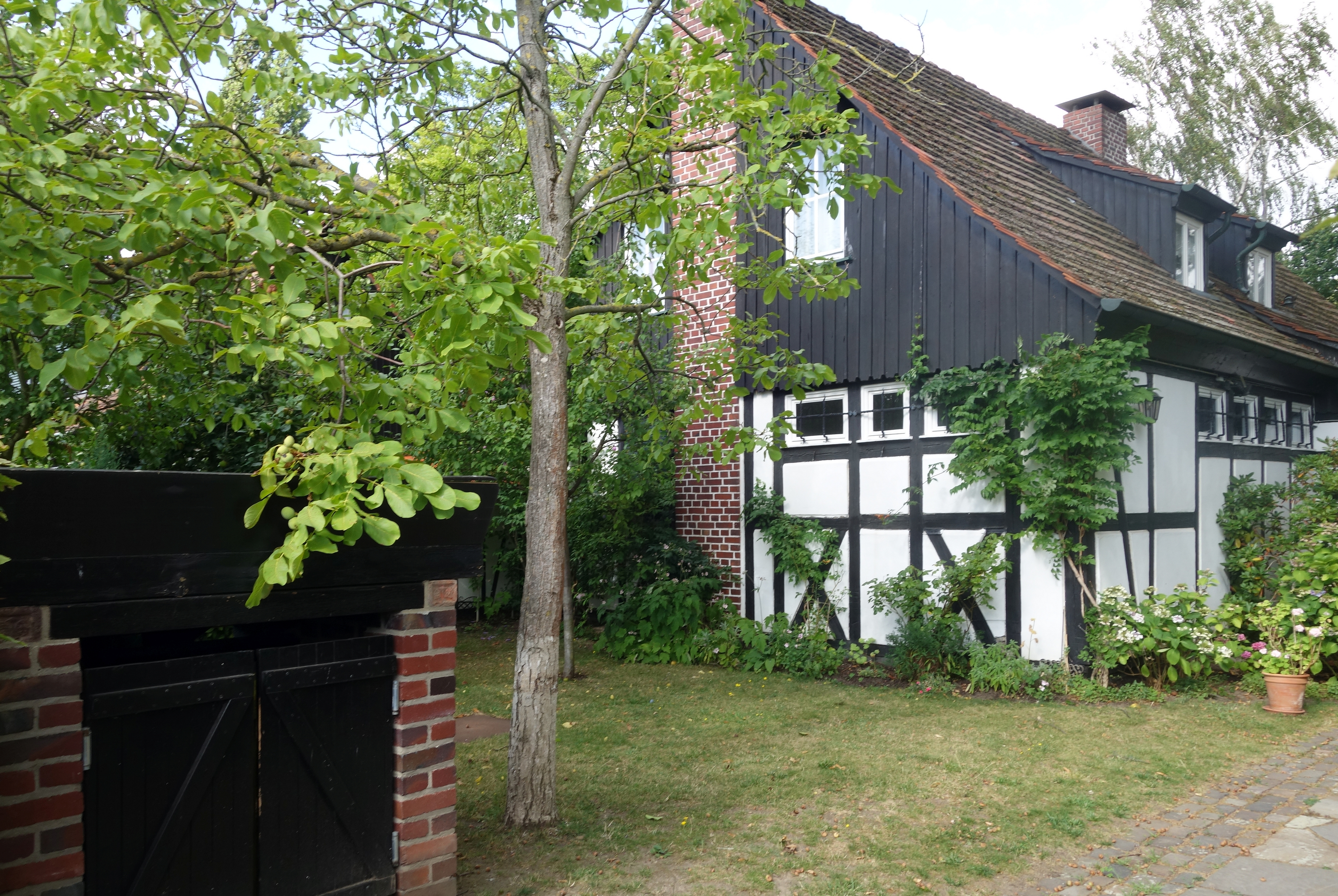 Leuchtenberger Kirchweg 47 (Düsseldorf), 2019.